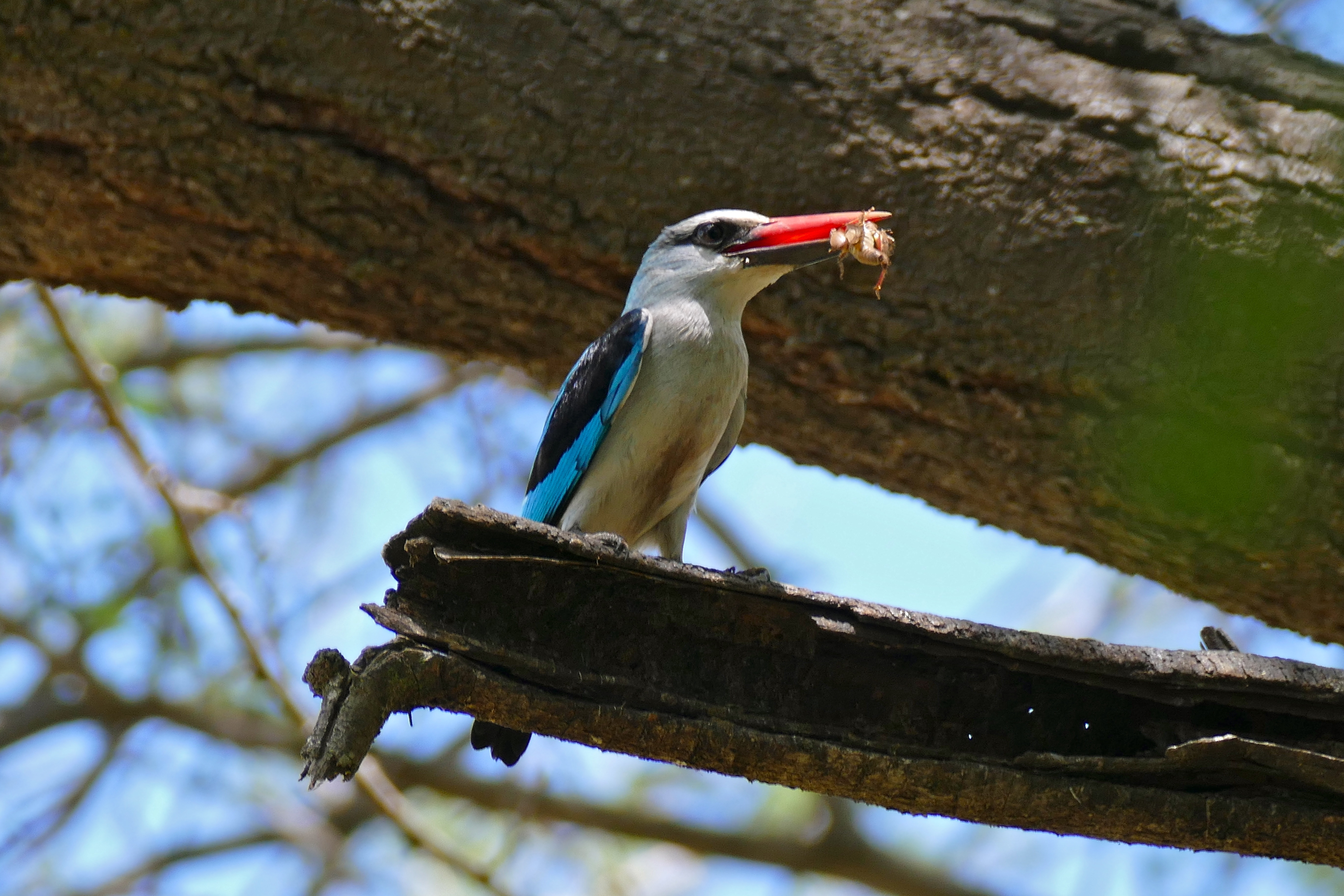 Satara Camp, Kruger NP, SOUTH AFRICA